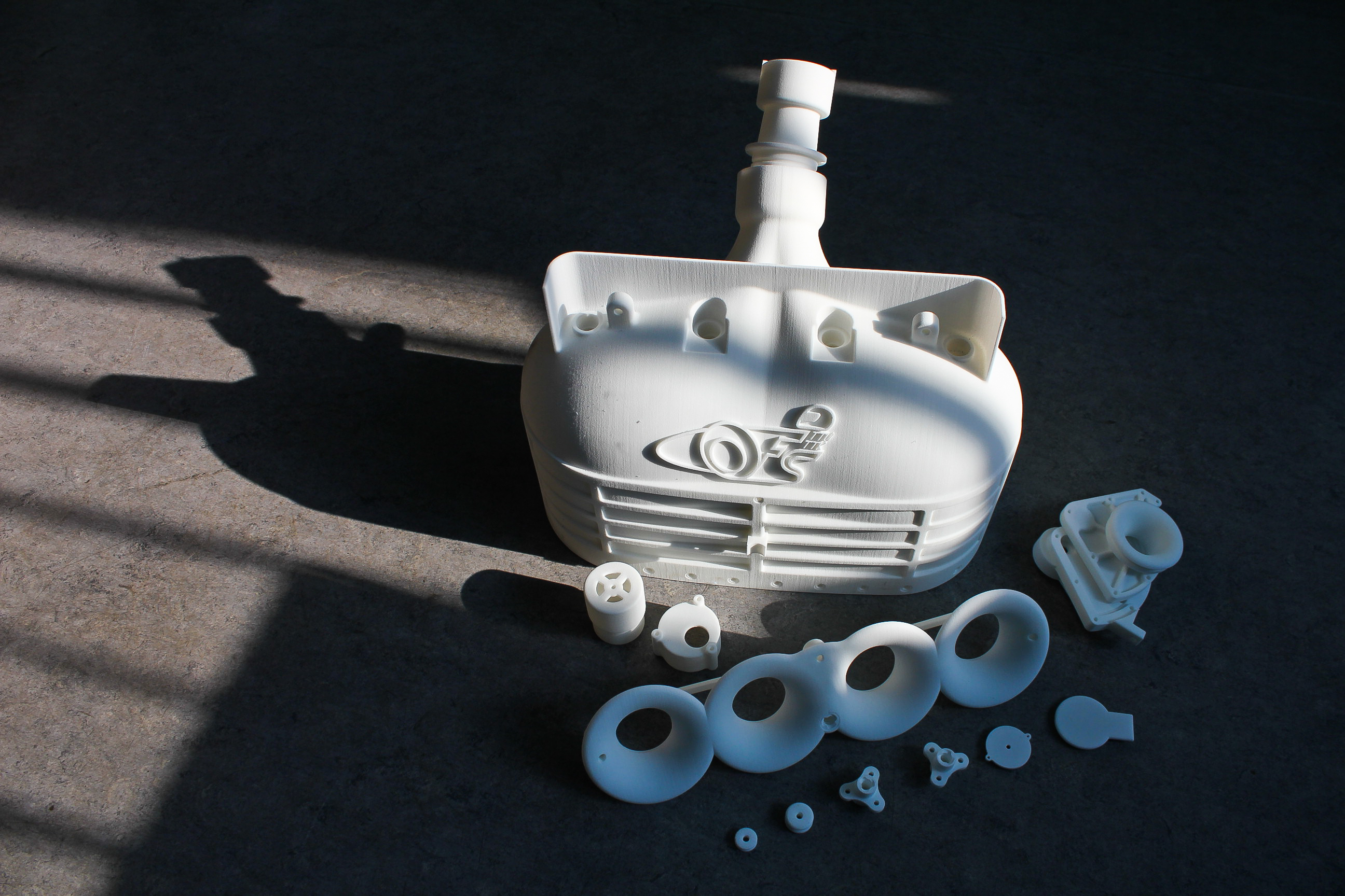 FS Team Tallinna poolt välja arendatud tudengivormeli sisselaskekollektori 3D prinditud osad.